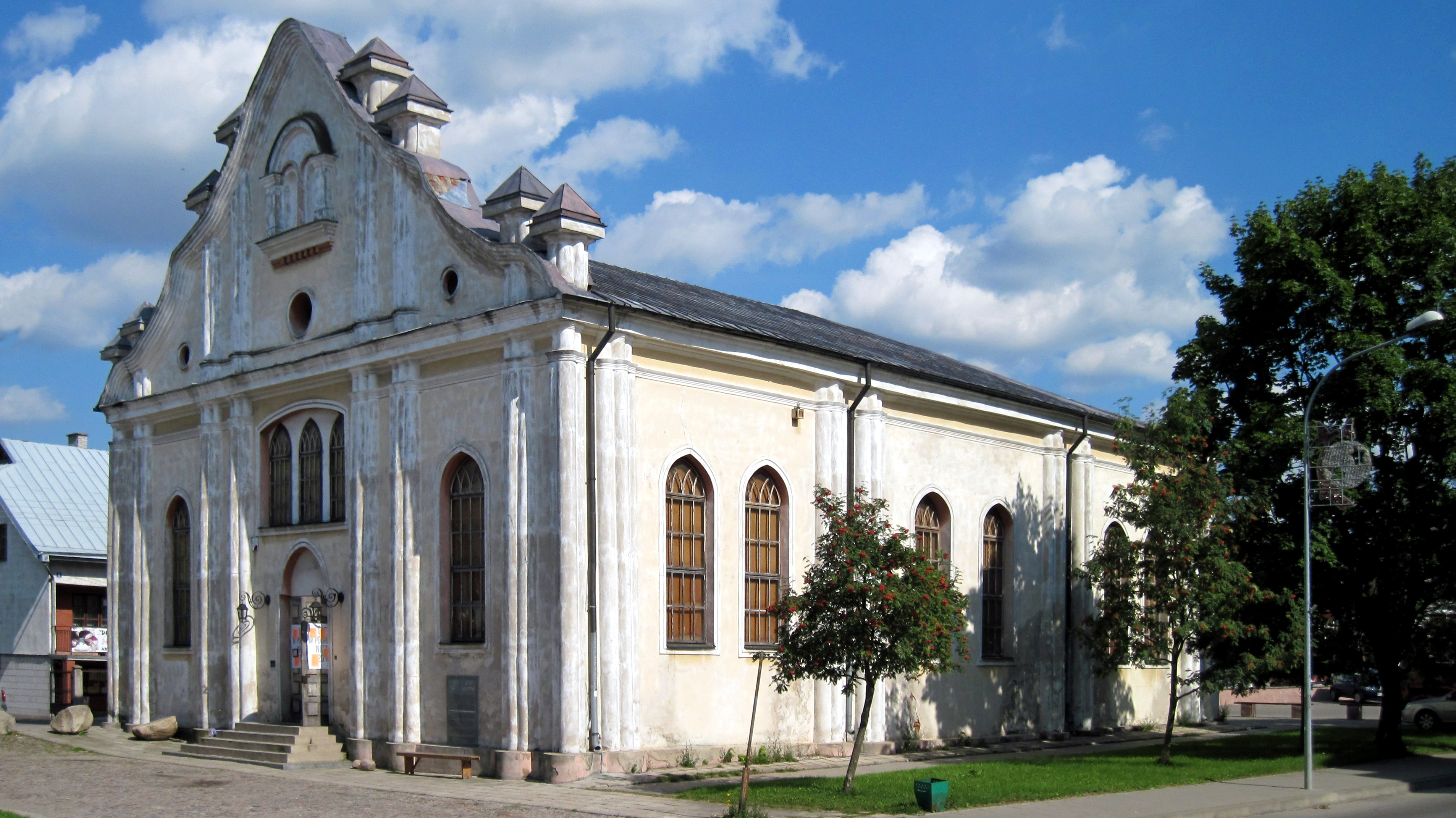 Sejny - Biała Synagoga 1885 r Sejny, Sejny